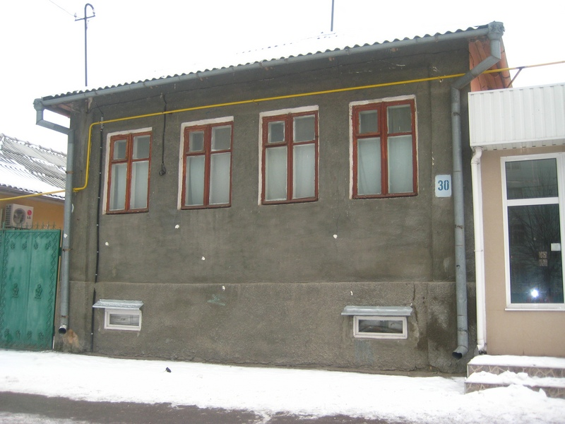 Здание бывшей синагоги приказчиков